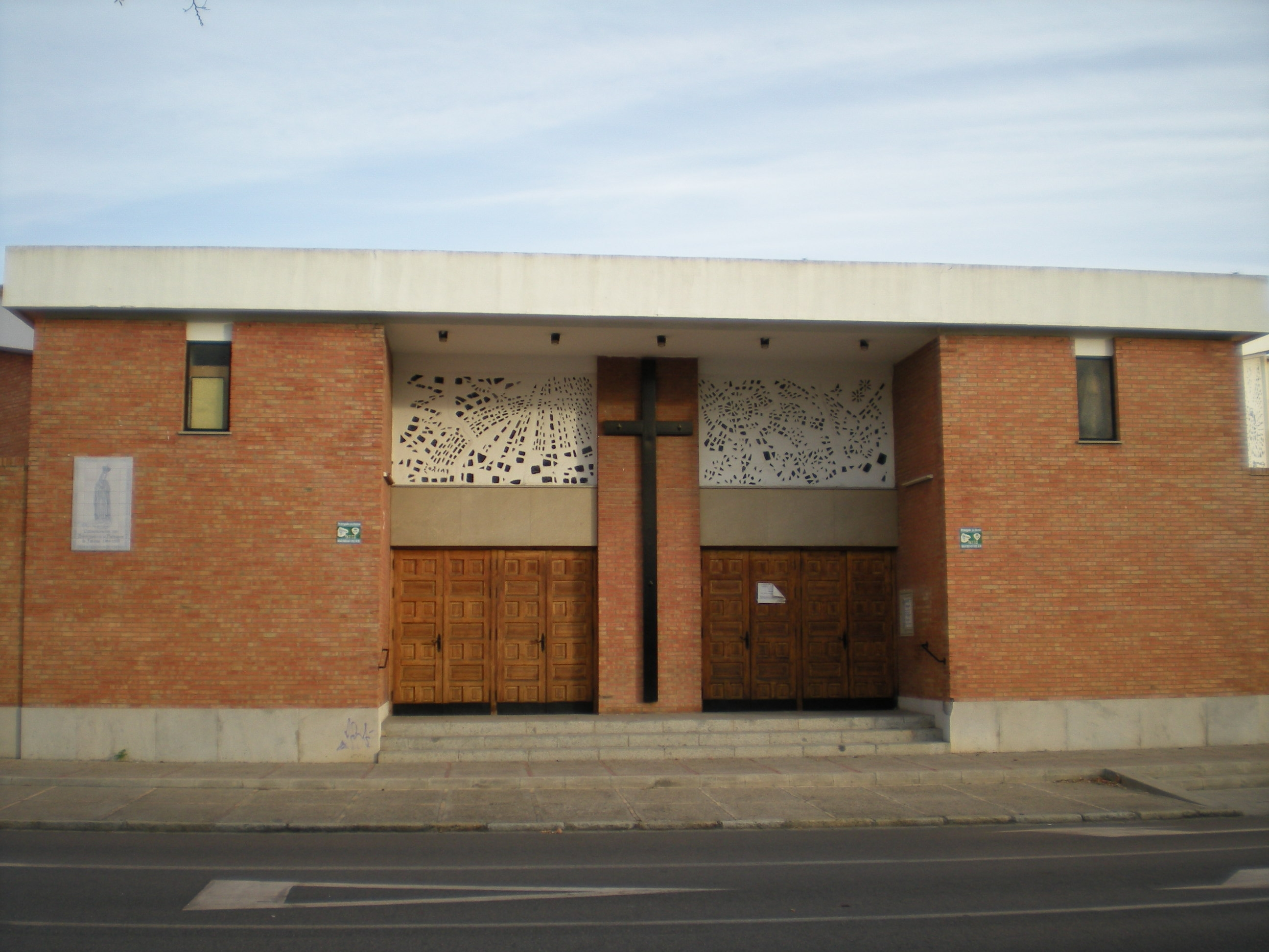 Puerta principal de la iglesia de Ntra. Sra. de Fátima en Jerez de la Frontera (Cádiz - España)